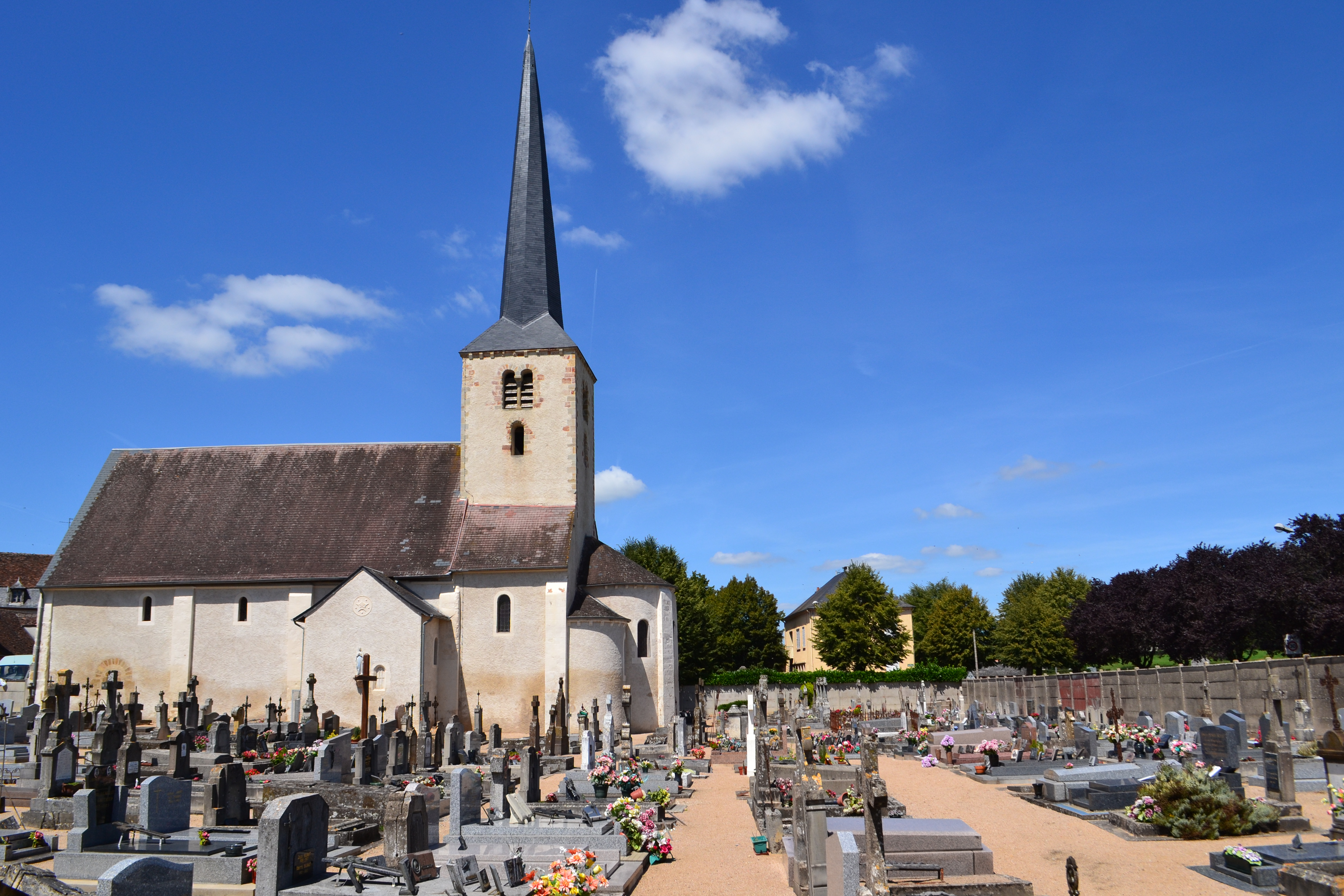 Eglise et cimetière de Champvert (Nièvre)